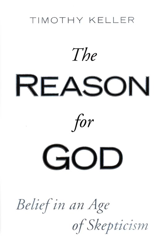 Timothy Keller Book